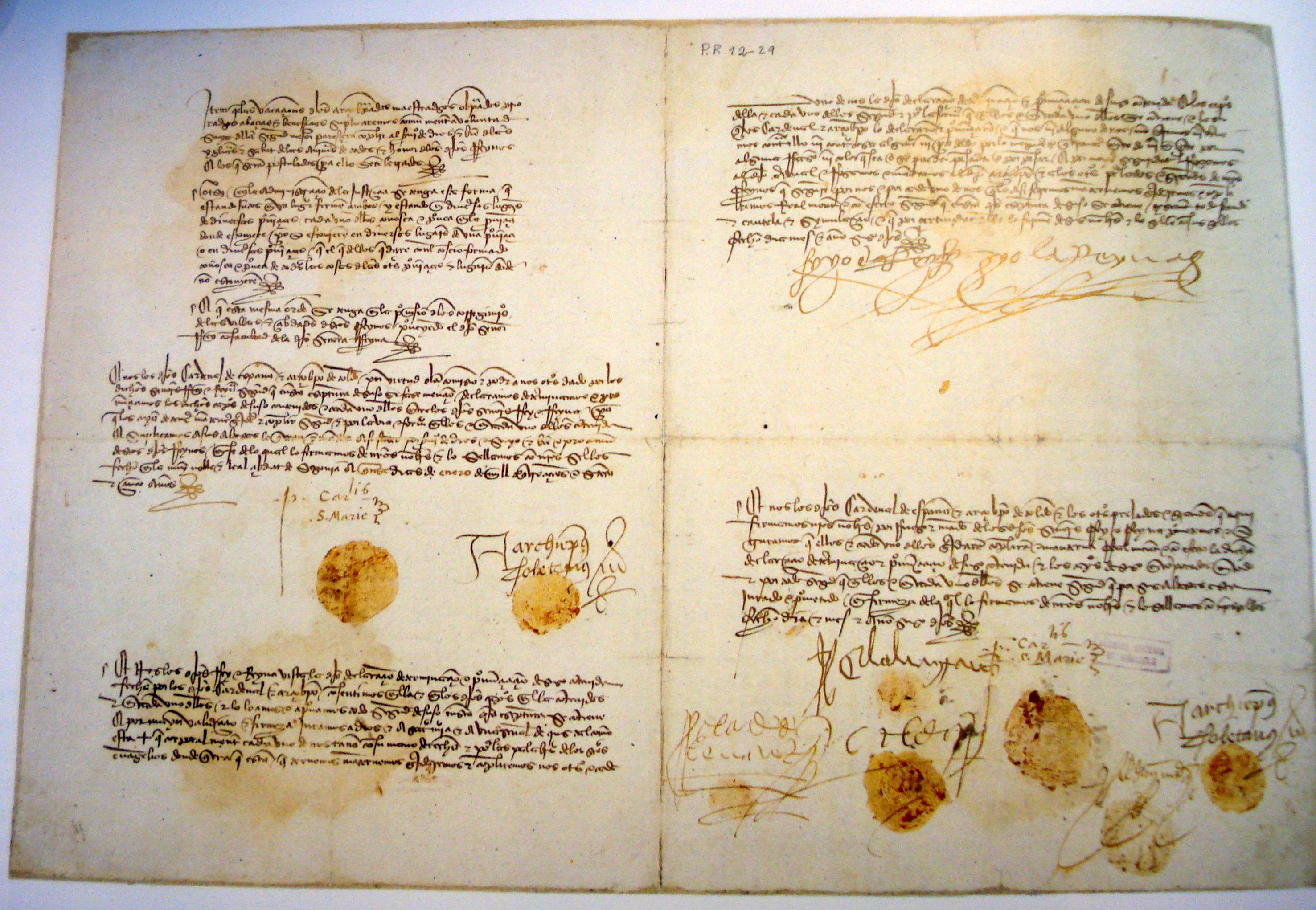 Sentencia arbitral de Segovia, por la que los príncipes Fernando de Aragón e Isabel de Castilla se repartieron las competencias para el futuro gobierno de sus reinos. Conservada en el Archivo General de Simancas (España).